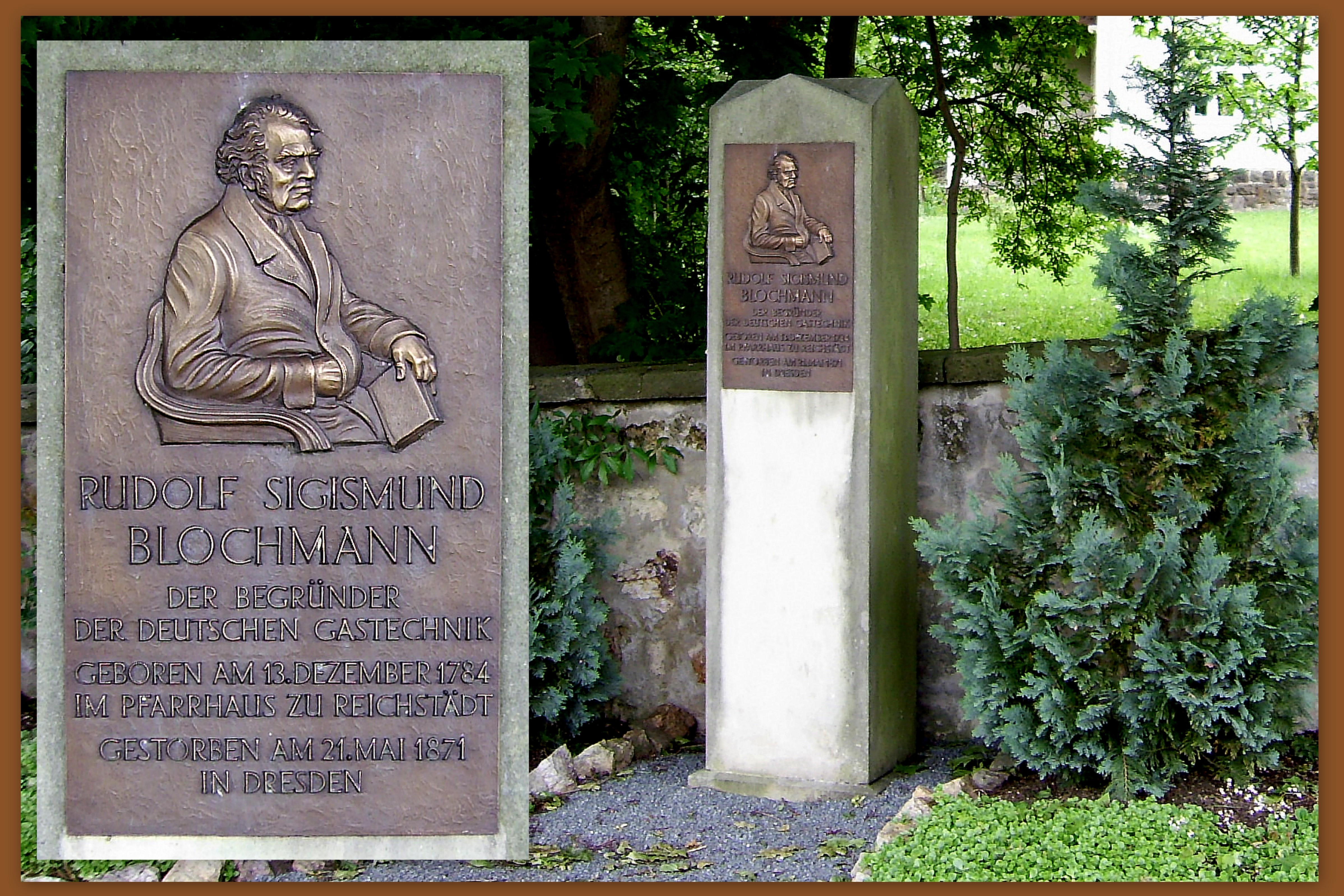 Rudolf Sigismund Blochmann zählt zu den Pionieren der Gasbeleuchtung in Deutschland. Sein Geburtsort war das Pfarrhaus in Reichstädt. Hier wurde 1996 dieser Gedenkstein errichtet.